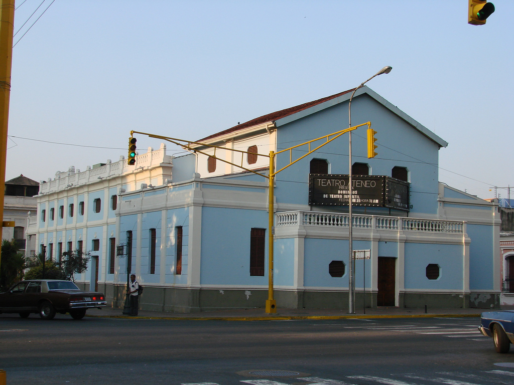 Avenida 19 de Abril. Maracay. Estado Aragua. Venezuela.